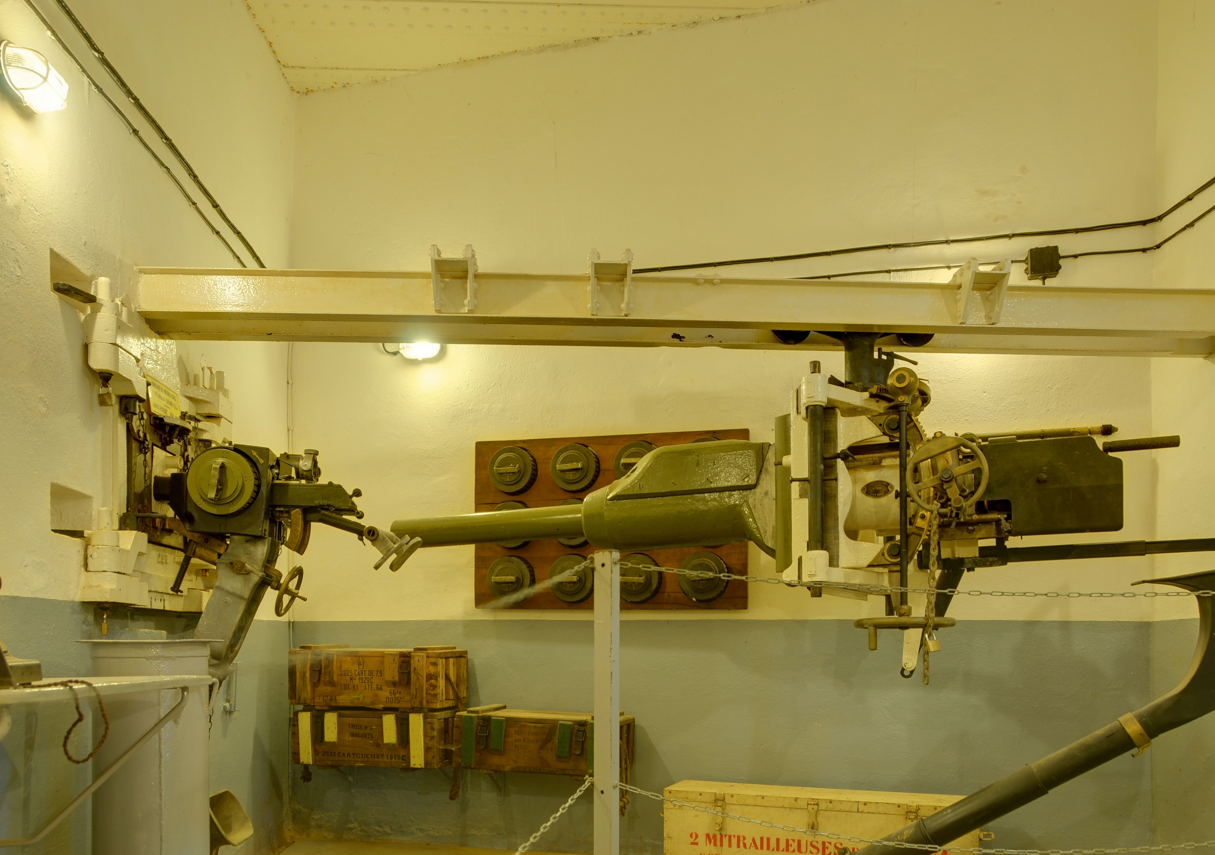 A l'intérieur du Bloc 7 (entrée des munitions). Le canon antichar de 47mm est en retrait, le jumelage de mitrailleuses est en place dans le créneau de tir. (HDR).